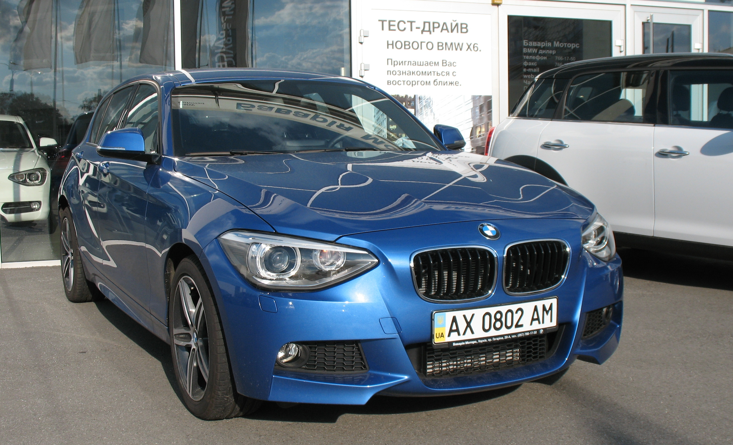 BMW BMW 1 (F20) in Kharkov City.